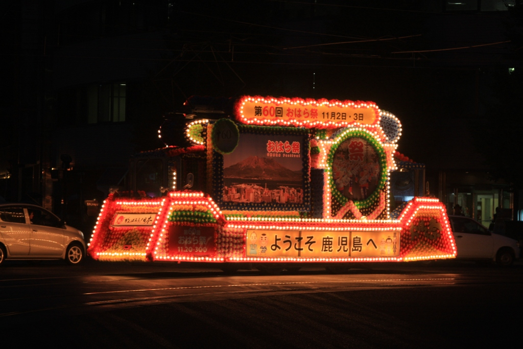 鹿児島市電 2011年の花電車